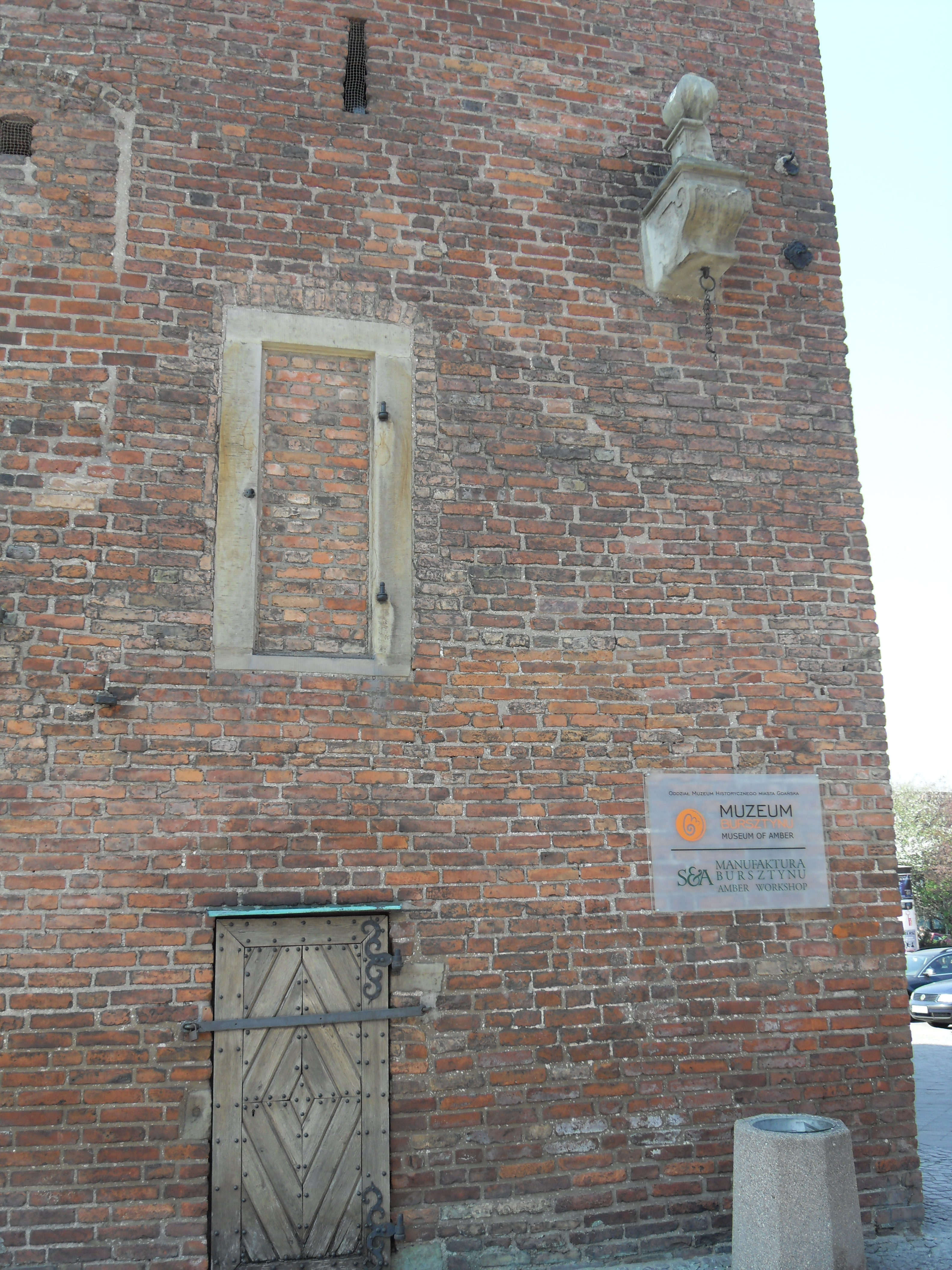 Wieża Więzienna w Gdańsku - pręgierz na wschodniej ścianie.